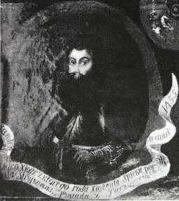 Беларуская (тарашкевіца): Партрэт Алелькі (Alelka)